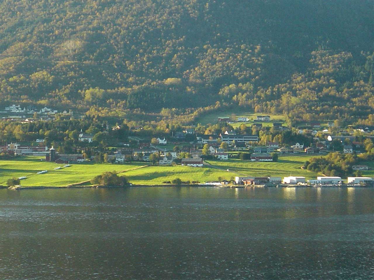 Eide at Nordmøre